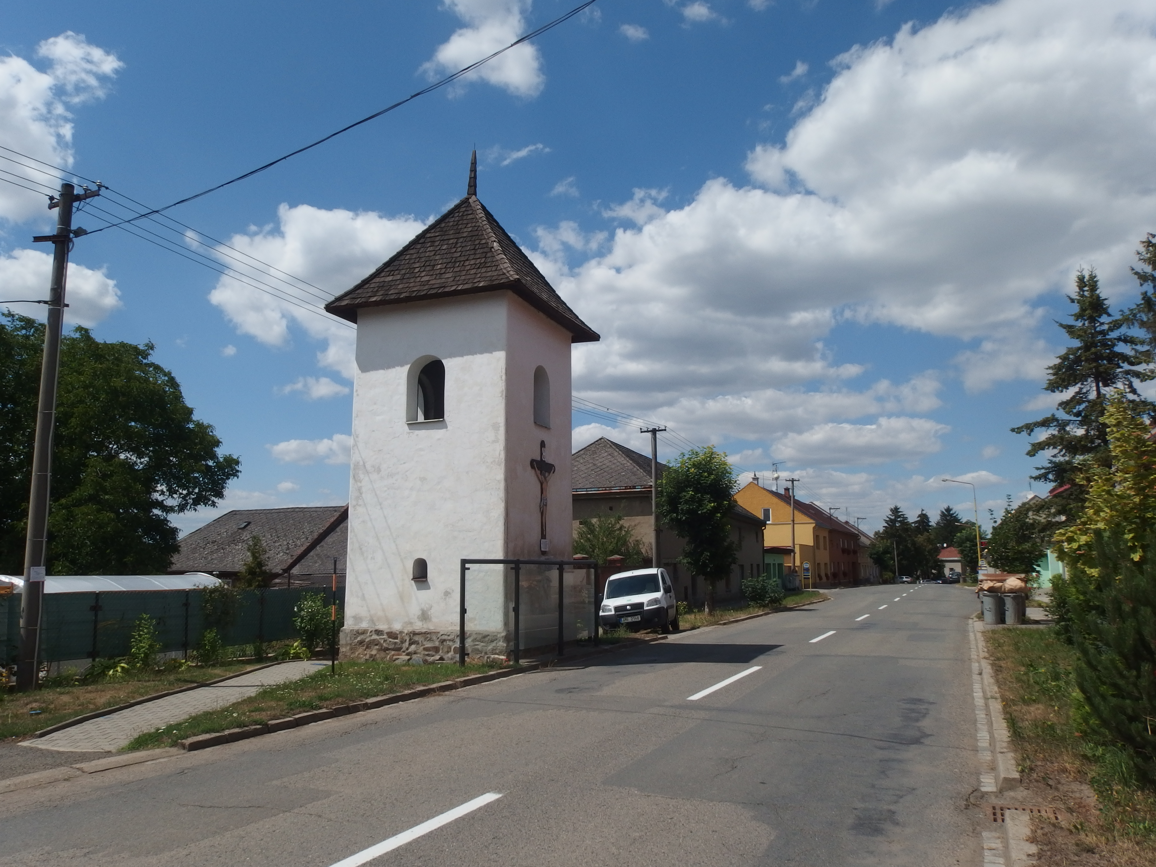 Zvonice, náves, proti čp. 41, Čechy (okres Přerov).